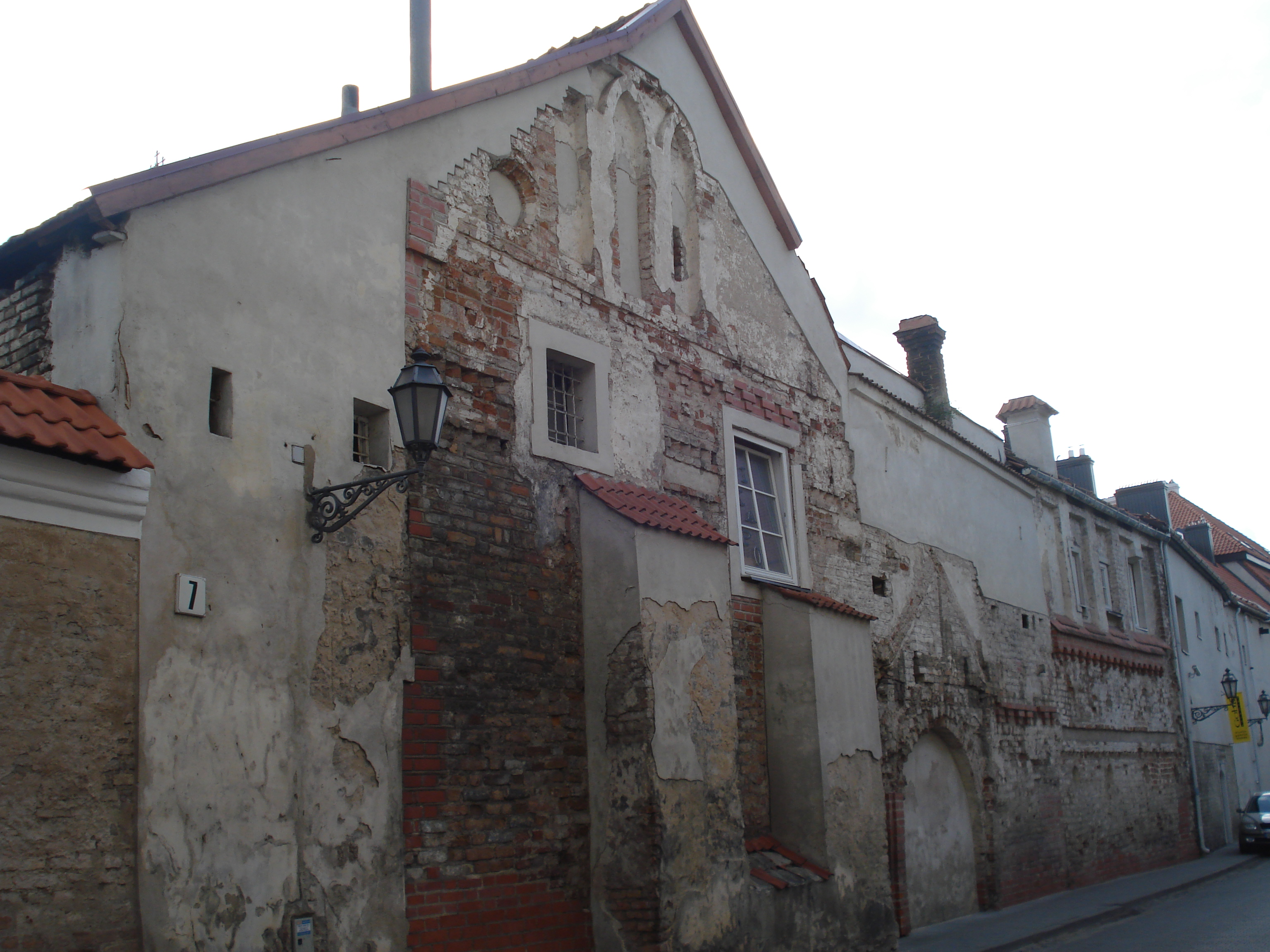 Švento Ignoto gatvė in Vilnius